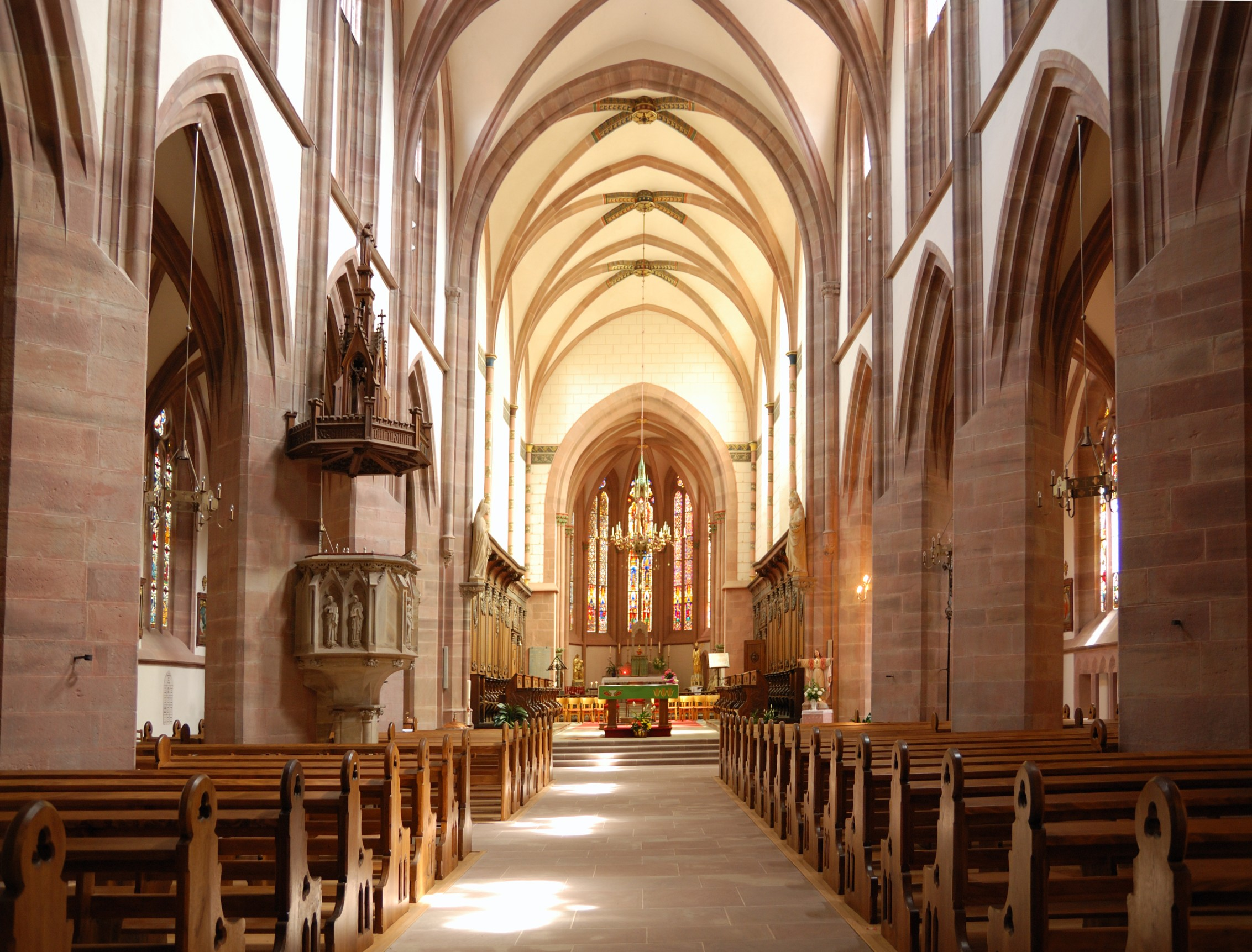 Stiftskirche Niederhaslach: Langhaus Richtung Chor